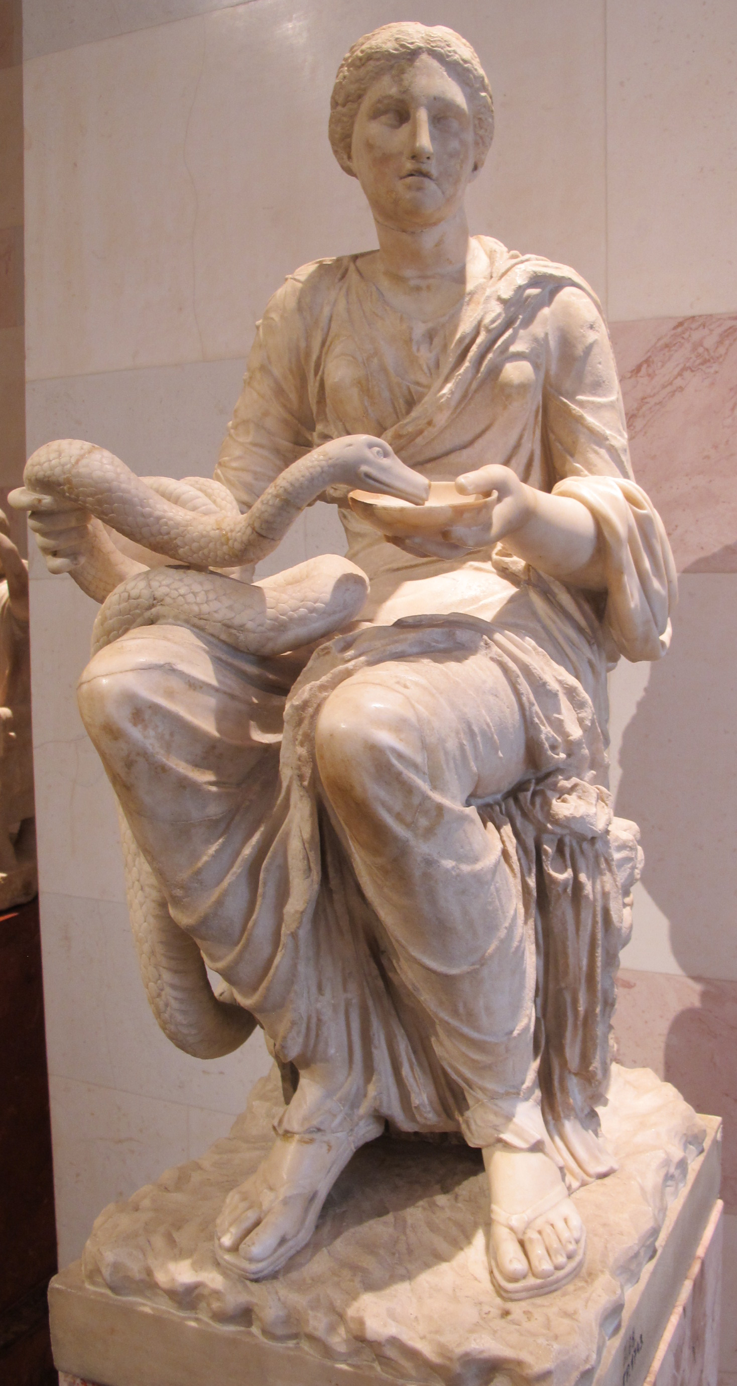 Hygea, copia romana da originale greco del III sec. ac